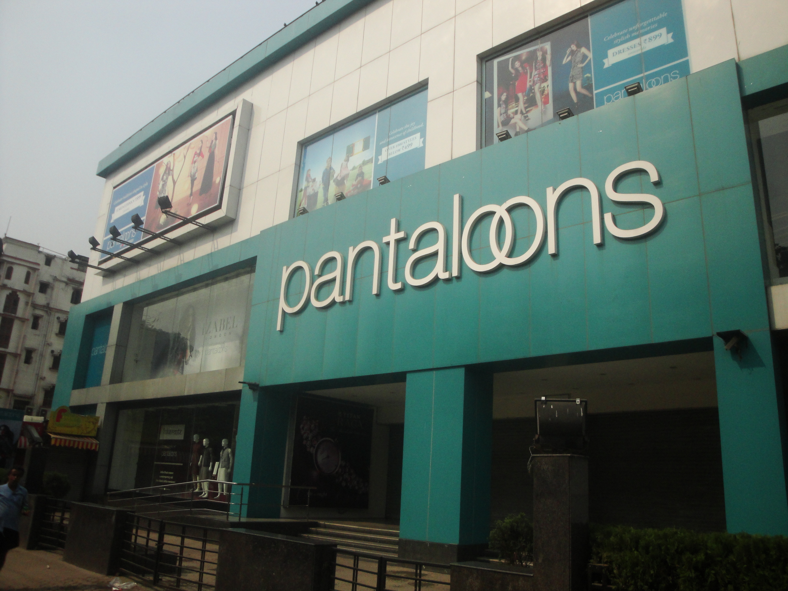 Pantaloons, Kankurgachi, Kolkata